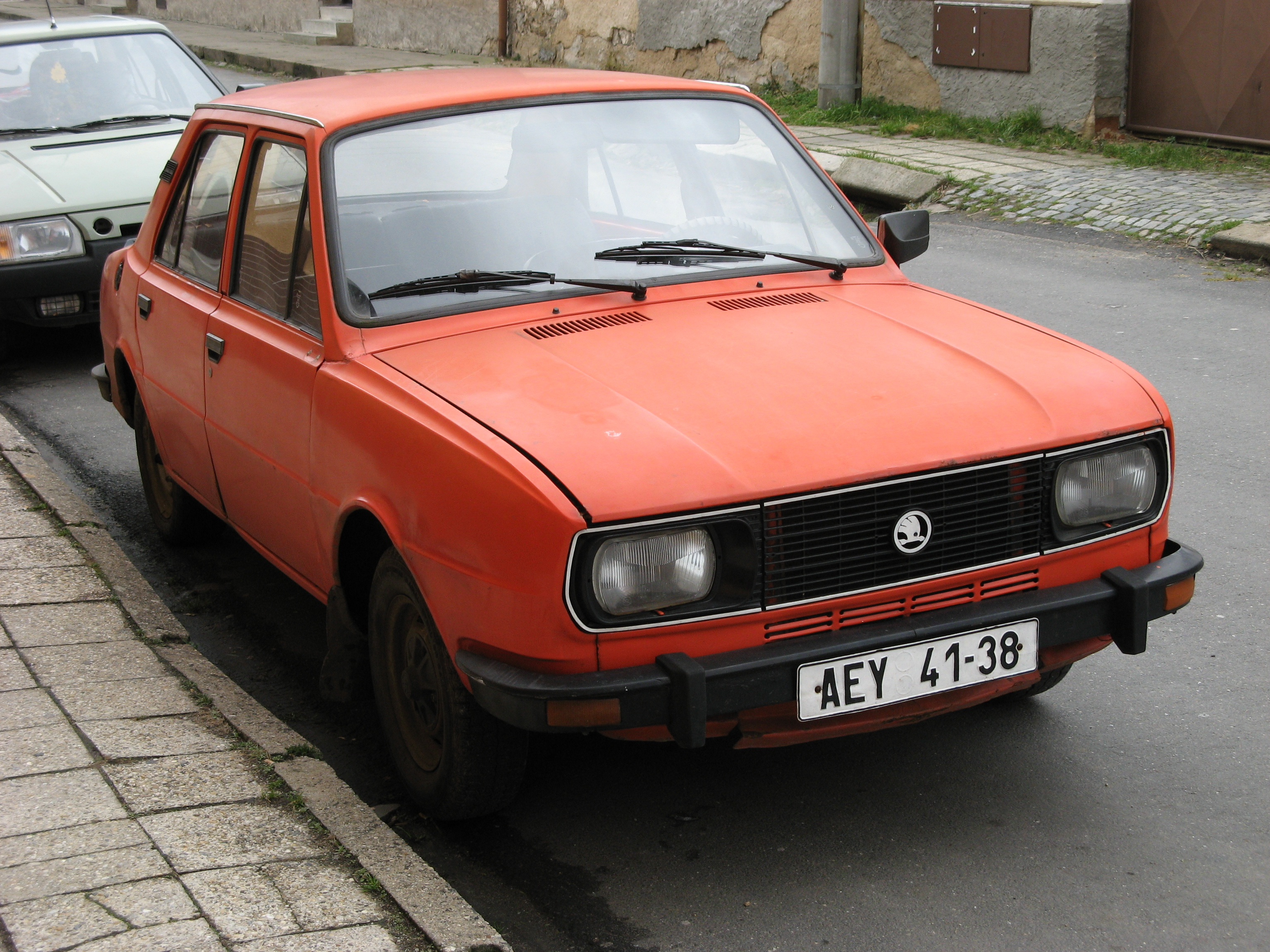 Škoda 105 L